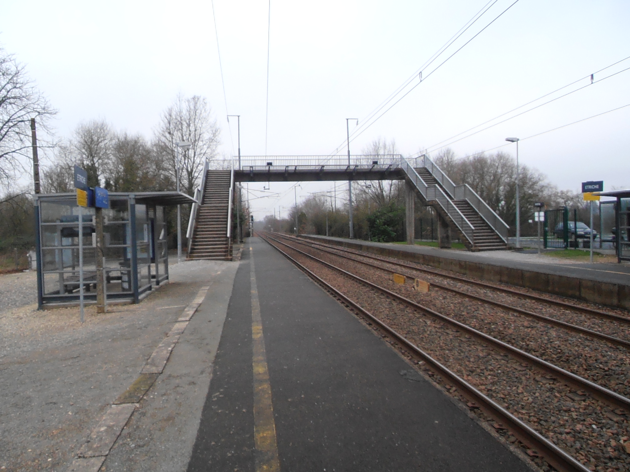 Les quais et la passerelle en direction du Mans